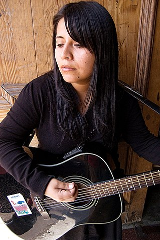 Natalia Molina foto musica